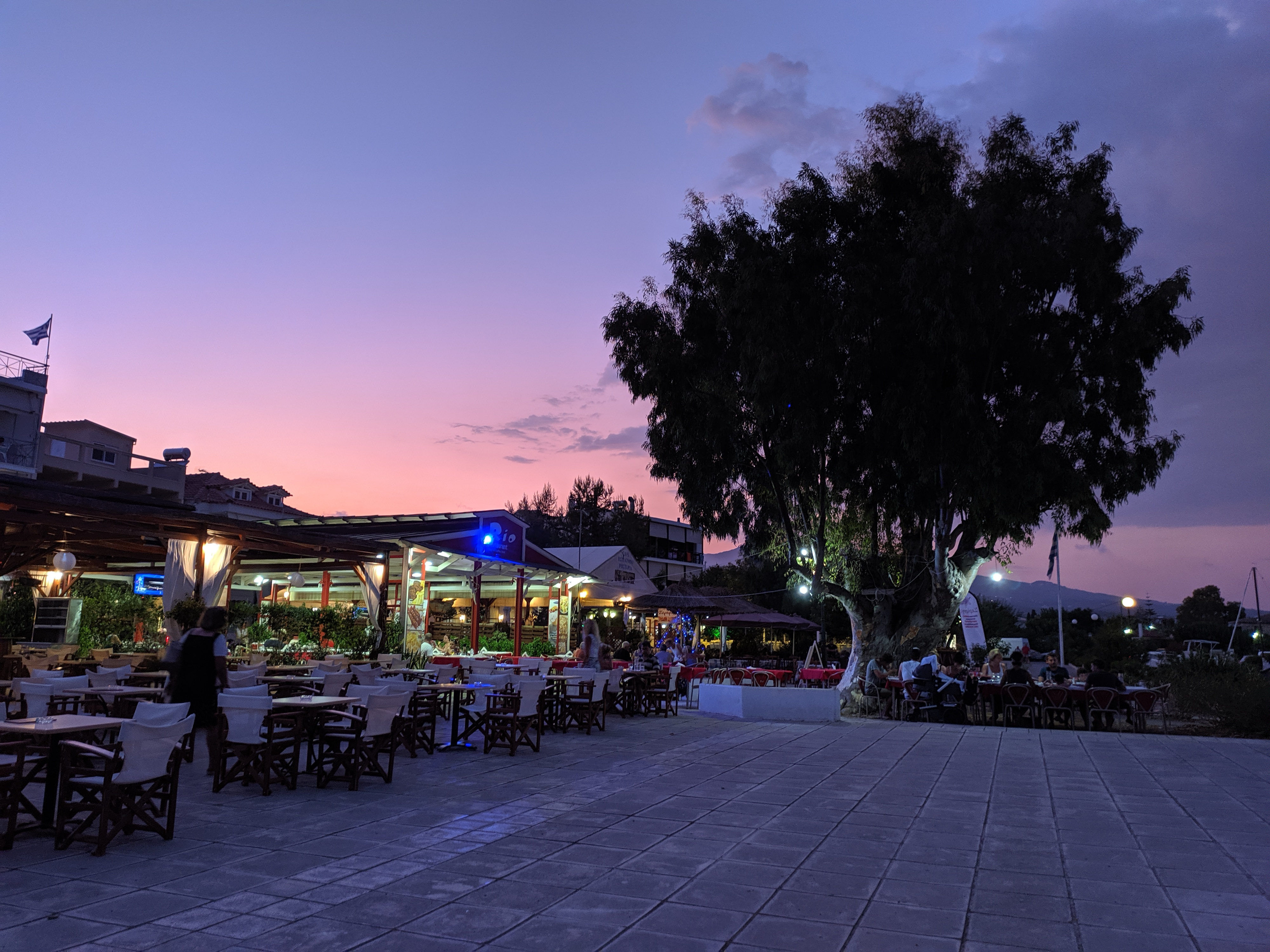 Η κεντρική πλατεία (Άγιος Ανδρέας, Μεσσηνίας).